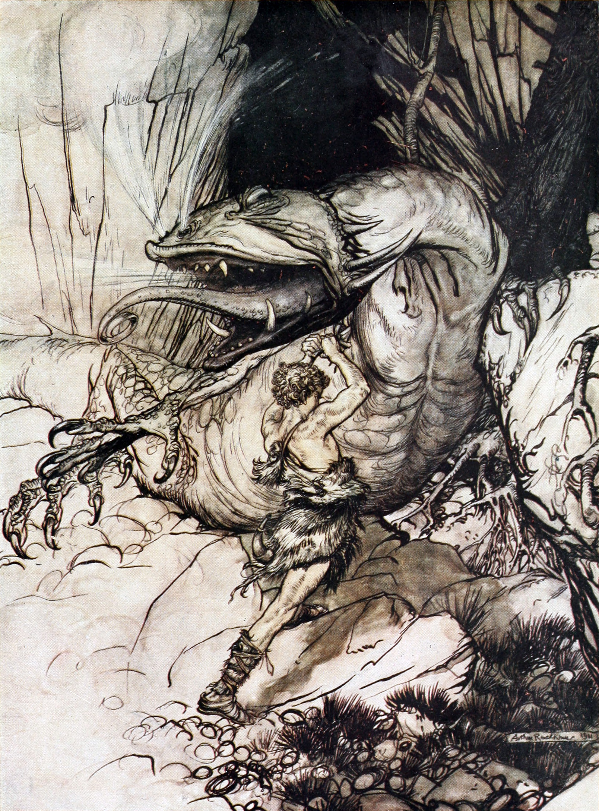 Siegfried kills Fafner.